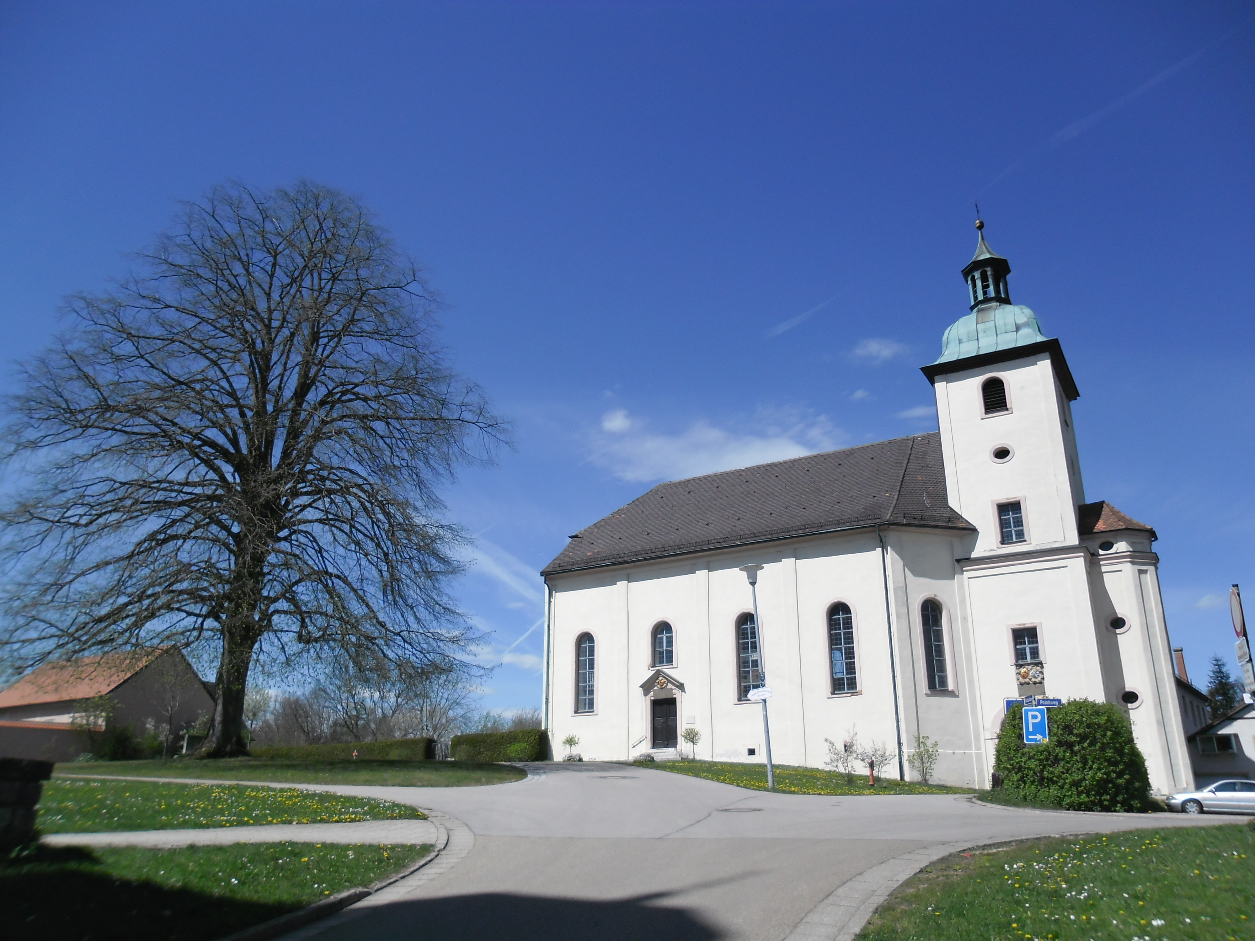 Die evangelische Kirche St. Michael auf dem Schlossberg in Sulzbürg